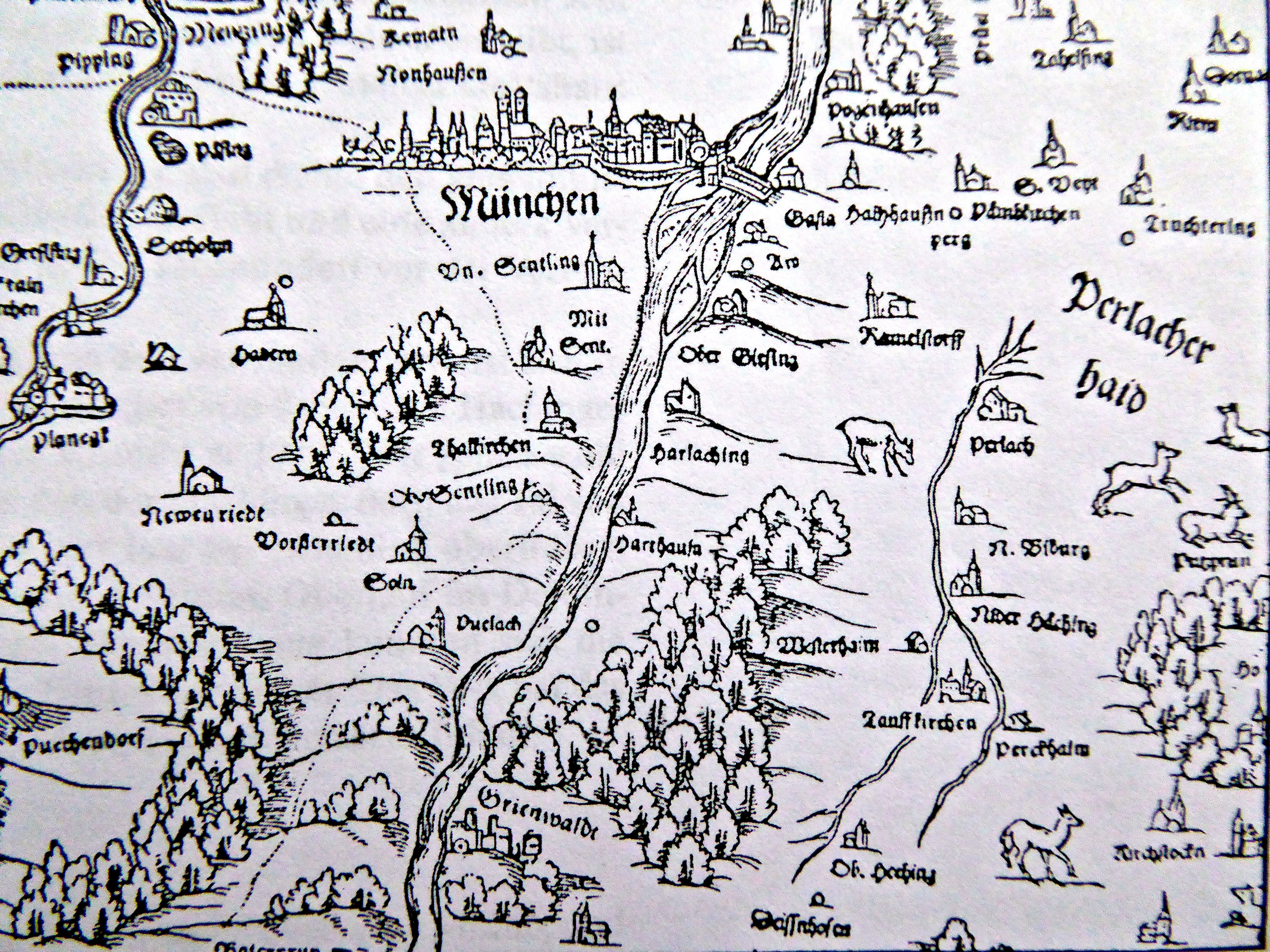 München und Umgebung (Ausschnitt). Philipp Apian: "Bairische Landtaflen"